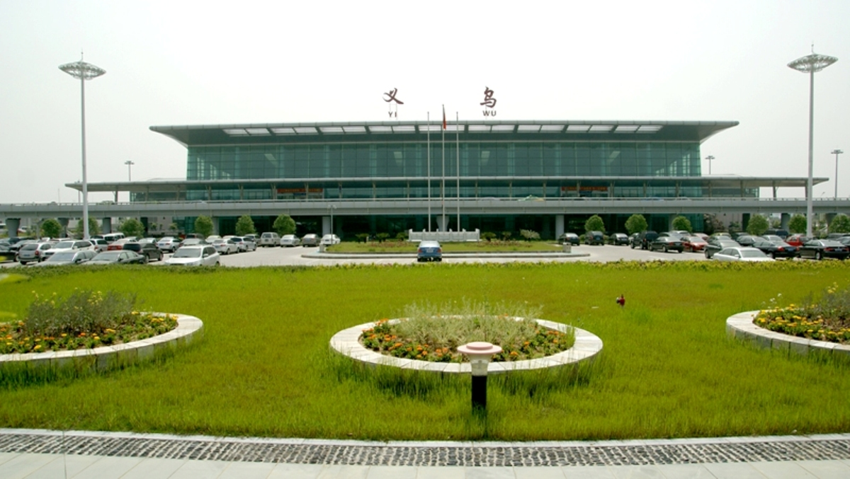 中文（香港）: 義烏機場候機樓